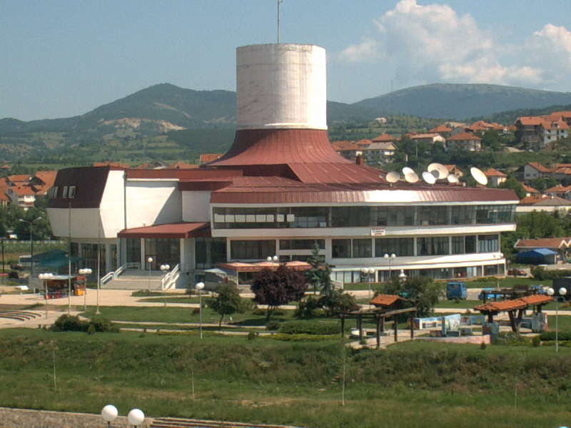 Културен Дом Асном